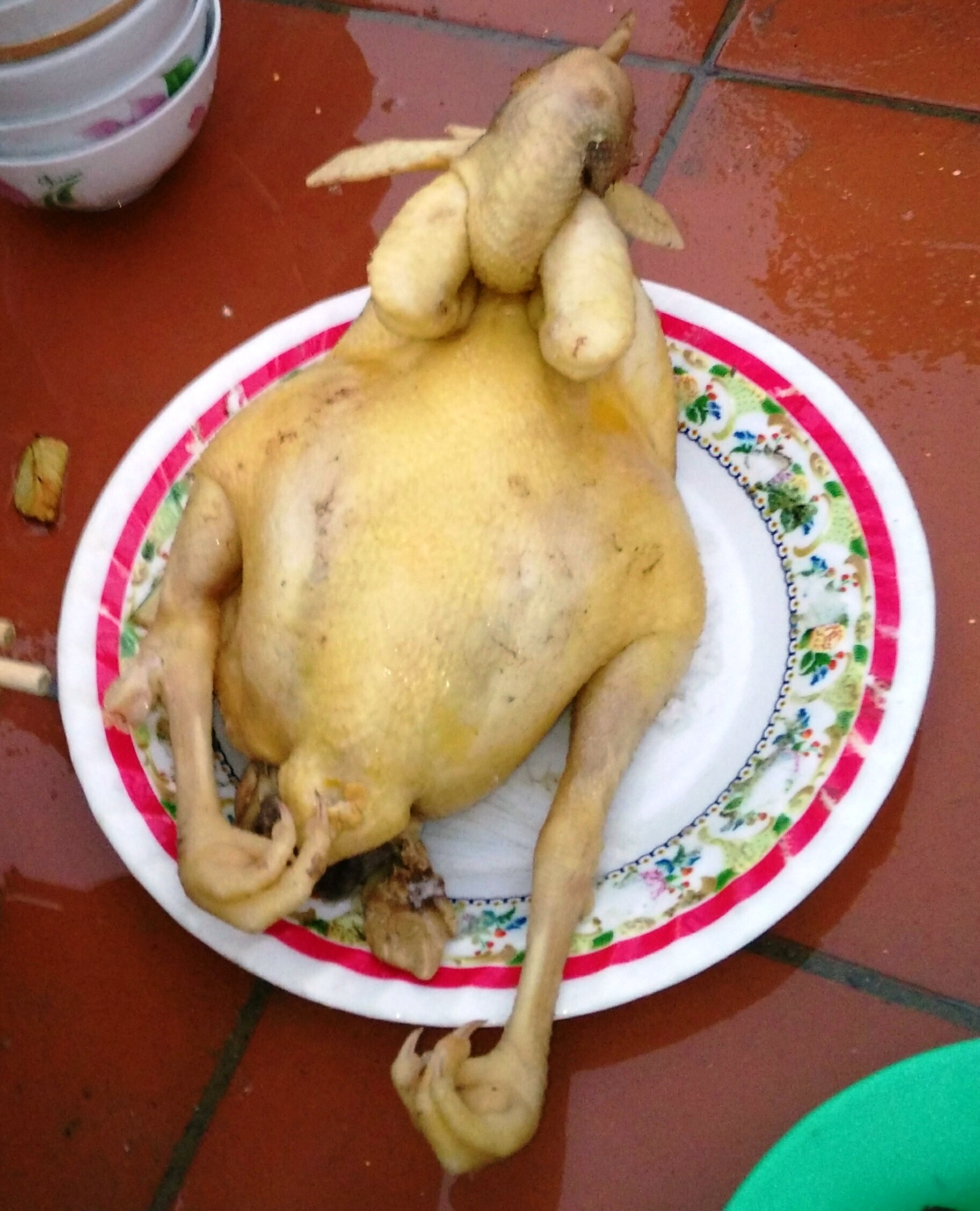 Hình tự chụp bằng máy ảnh cá nhân về thịt một con gà tơ để cúng